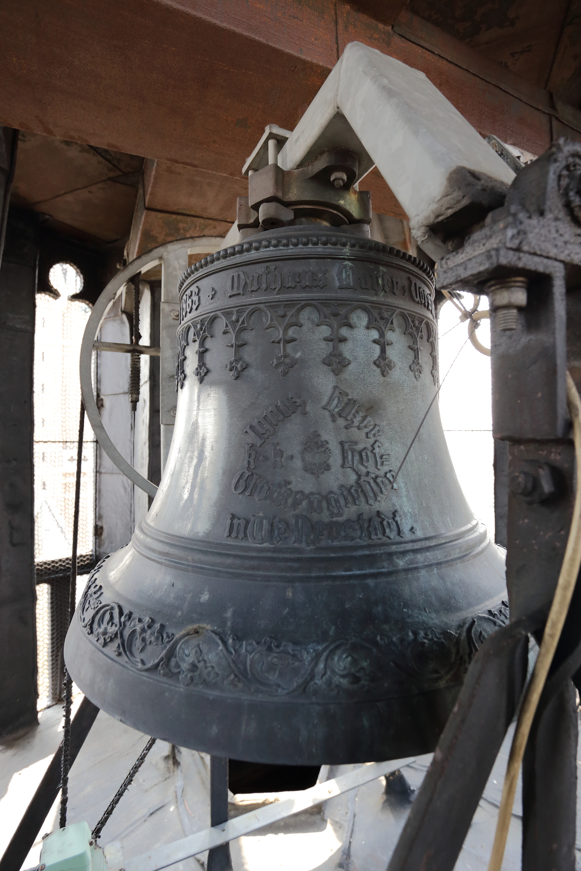 Die sogenannte Totenglocke im Sanktusturm (Vierungsturm) der Othmarkirche im 3. Wiener Gemeindebezirk. 1868 von der Wiener Neustädter Glockengießerei Ignaz Hilzer gegossen.